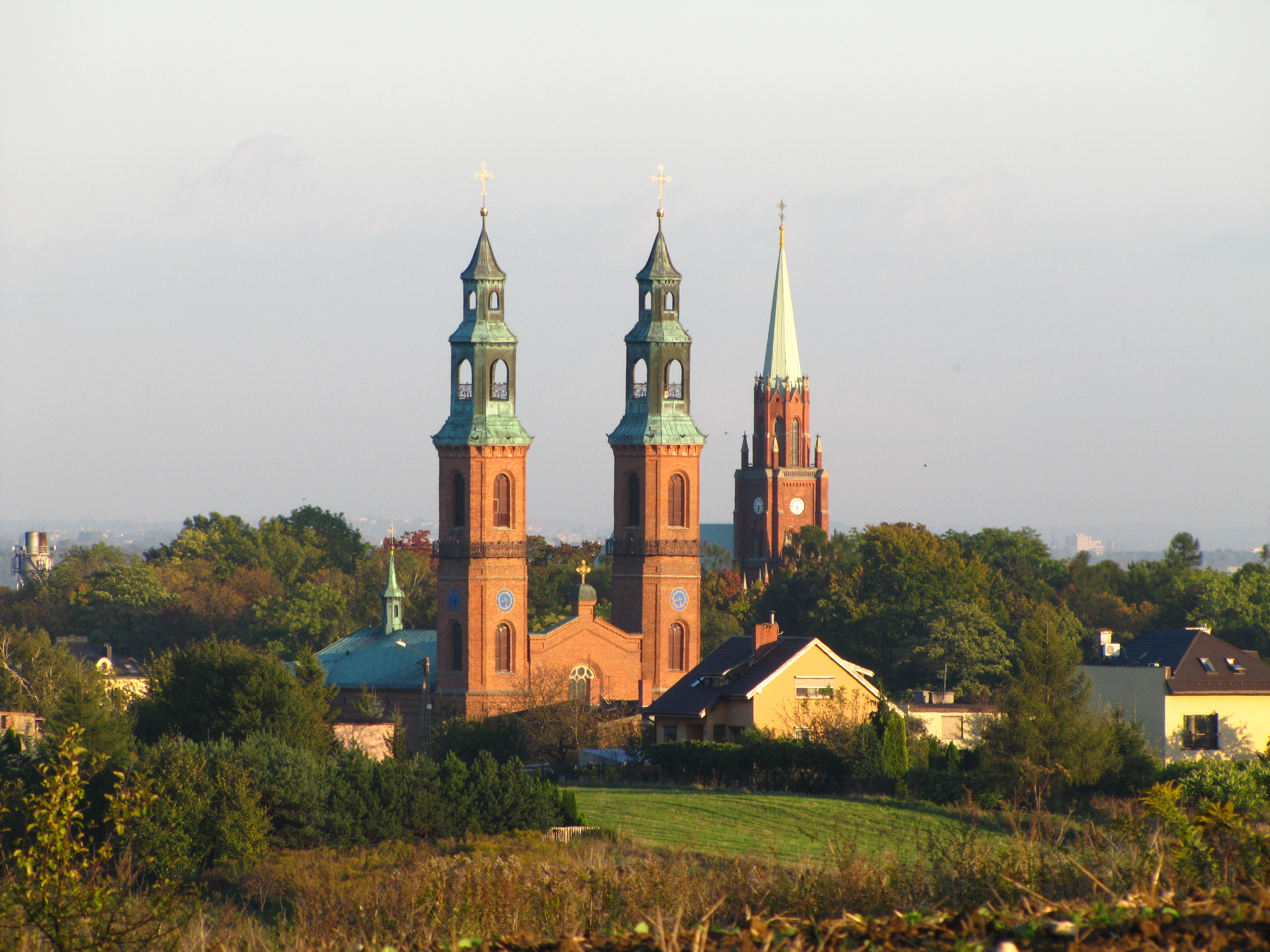 Piekary Śląskie, Bazylika Najświętszej Marii Panny i św. Bartłomieja, 1842-1849